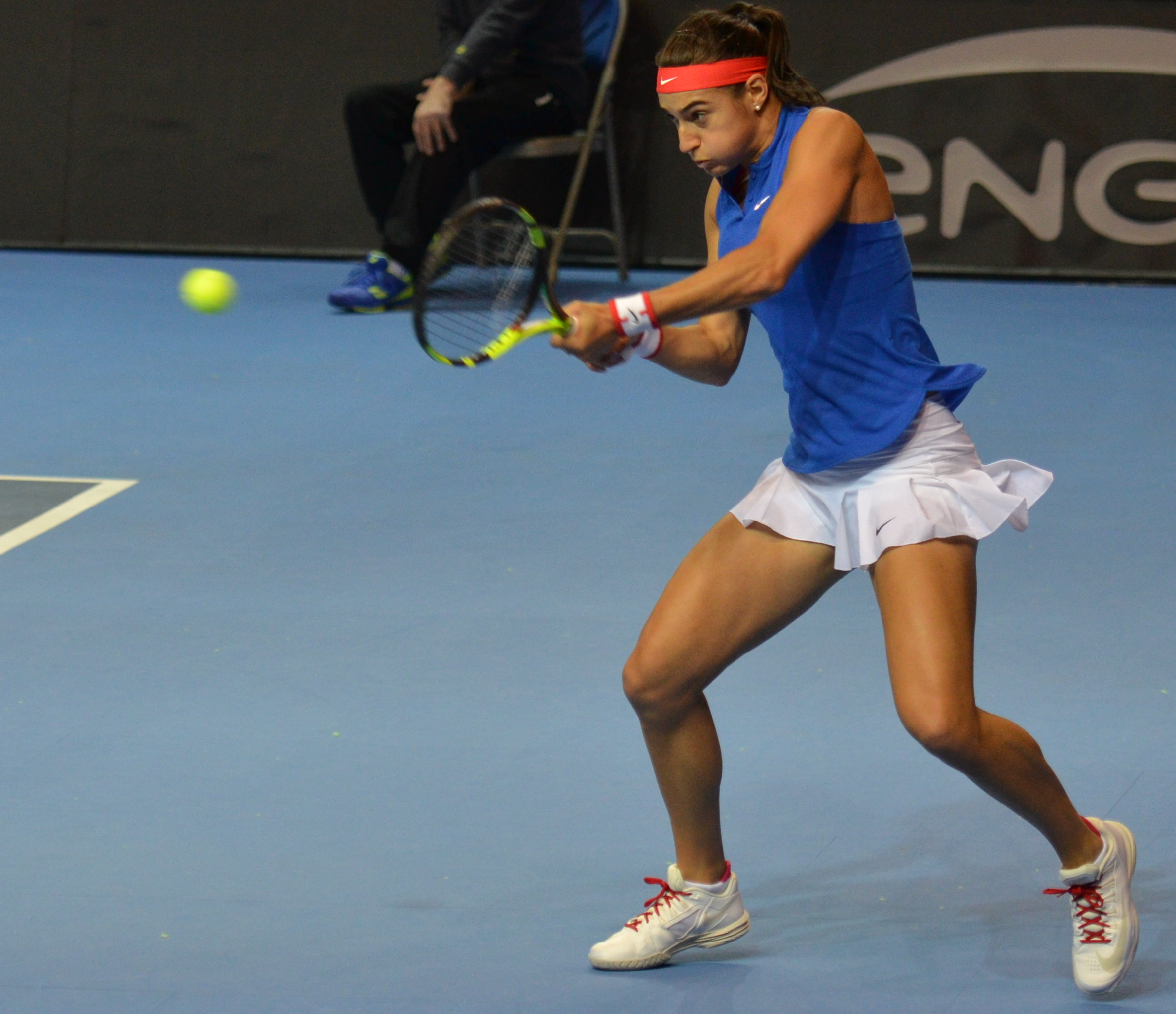 PPP_3260